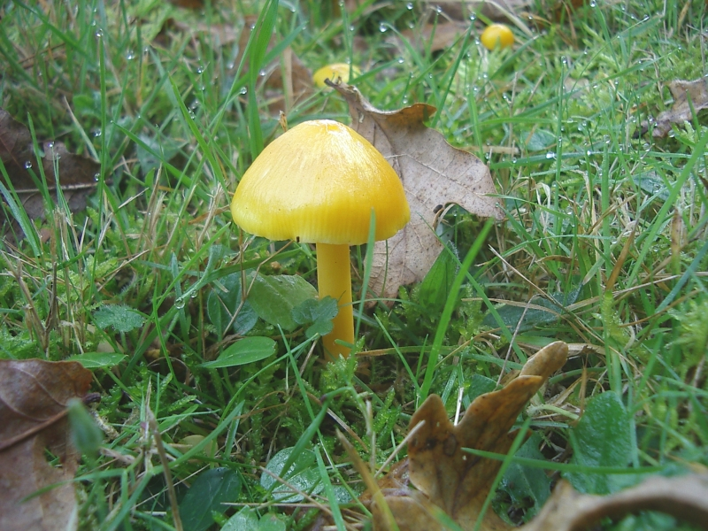 Hygrocybe chlorophana (rivière d'Étel, Belz, Morbihan, France)